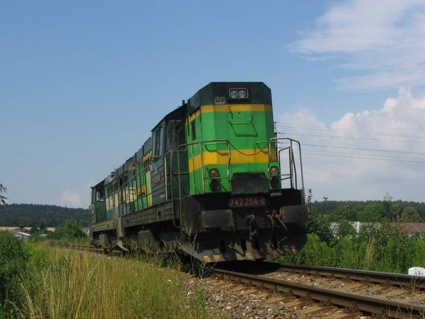 Lokomotiva řady 742, stanice Česká Skalice